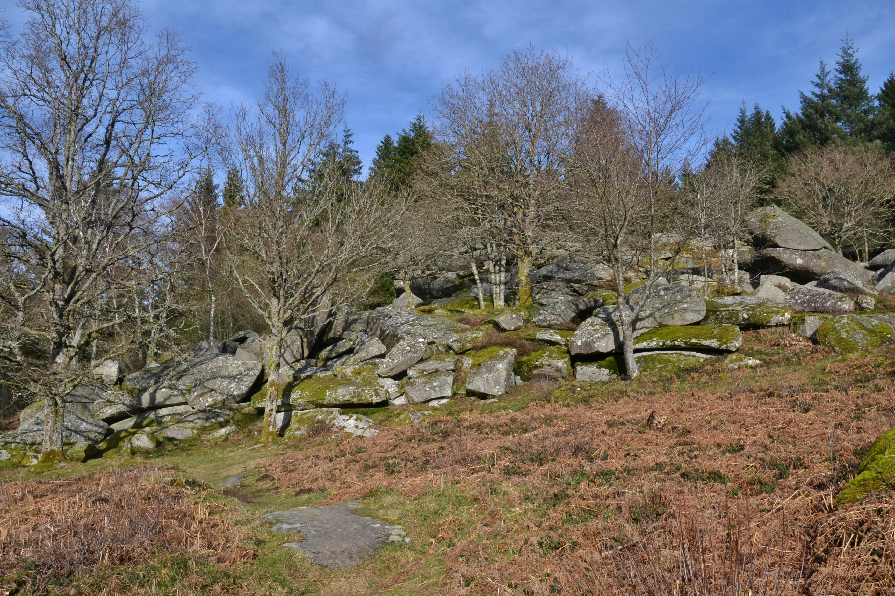 Chaos granitique du Maupuy (Pierres Civières), commune de Saint-Léger-le-Guérétois (Creuse, France)